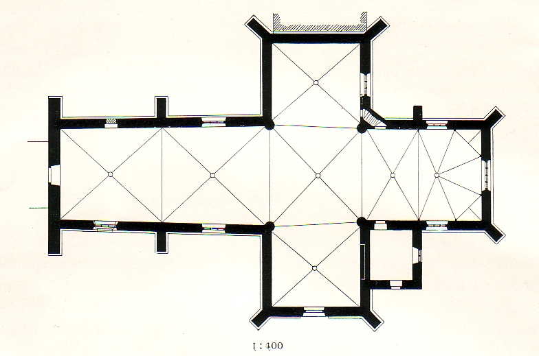 Stiftskirche Bielefeld-Schildesche